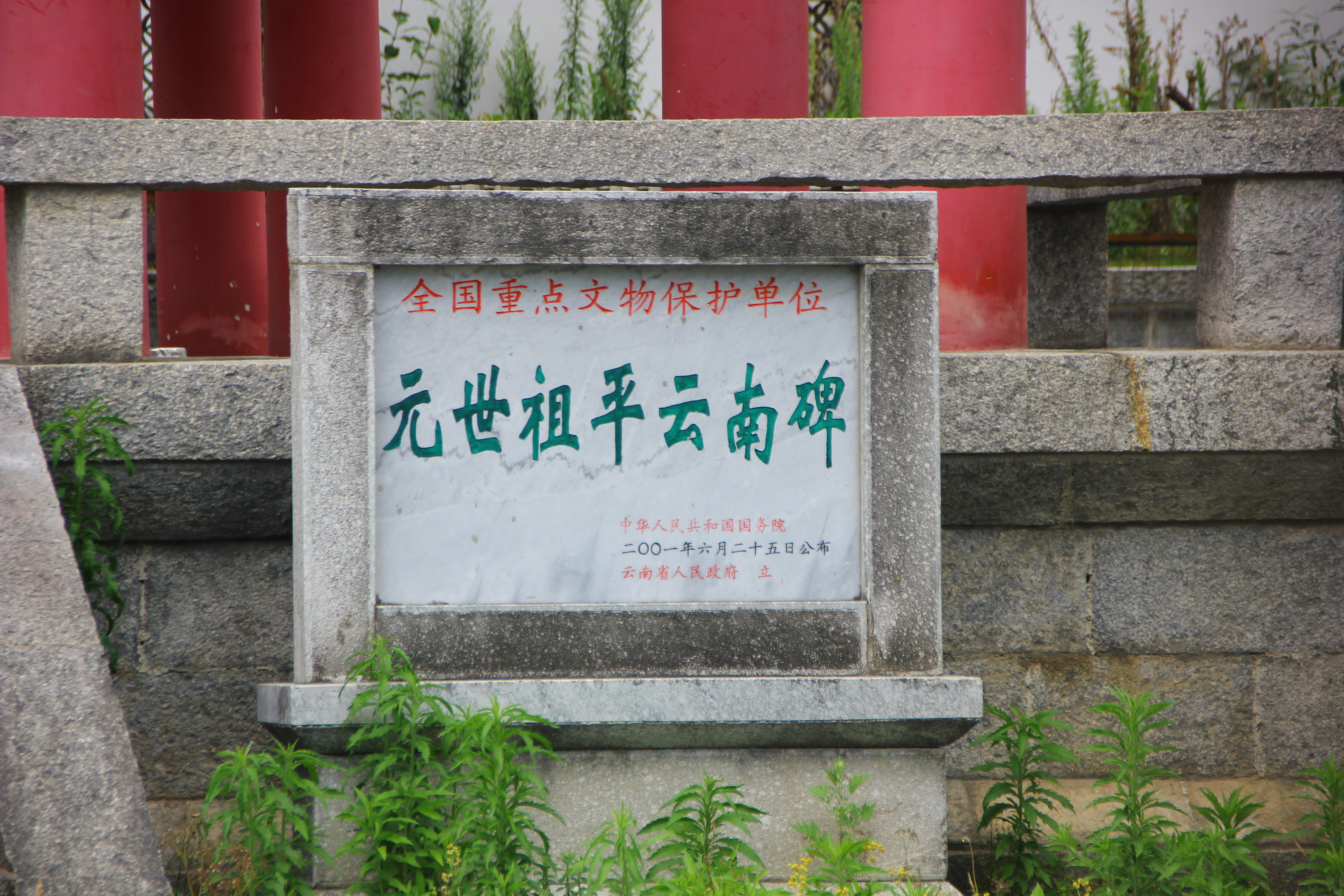 中文（中国大陆）: 元世祖平云南碑全国重点文物保护单位保护碑